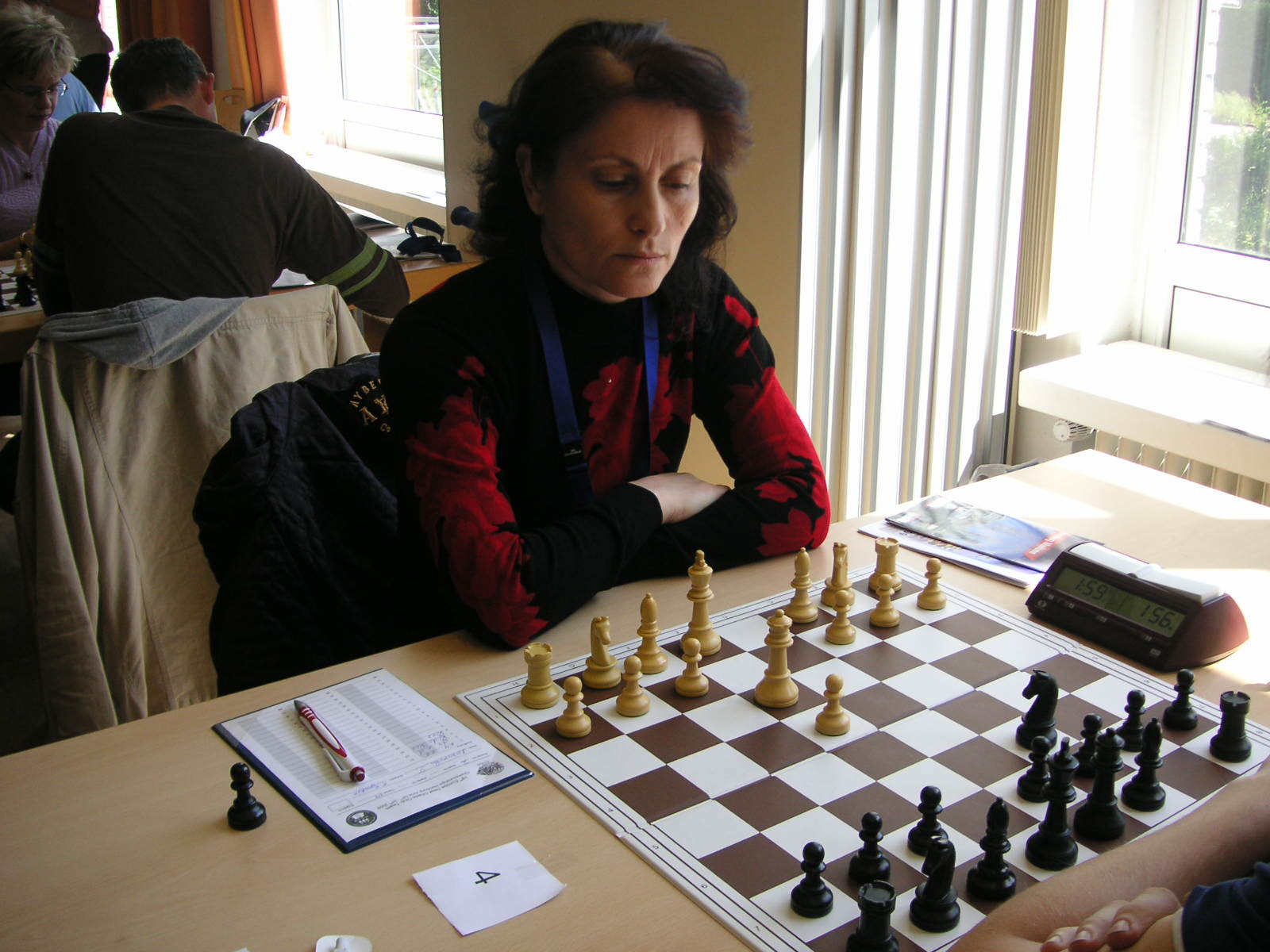 Гълъбина Лозанова Чокова на Европейската клубна купа по шахмат, 2009 г., проведена в Германия.